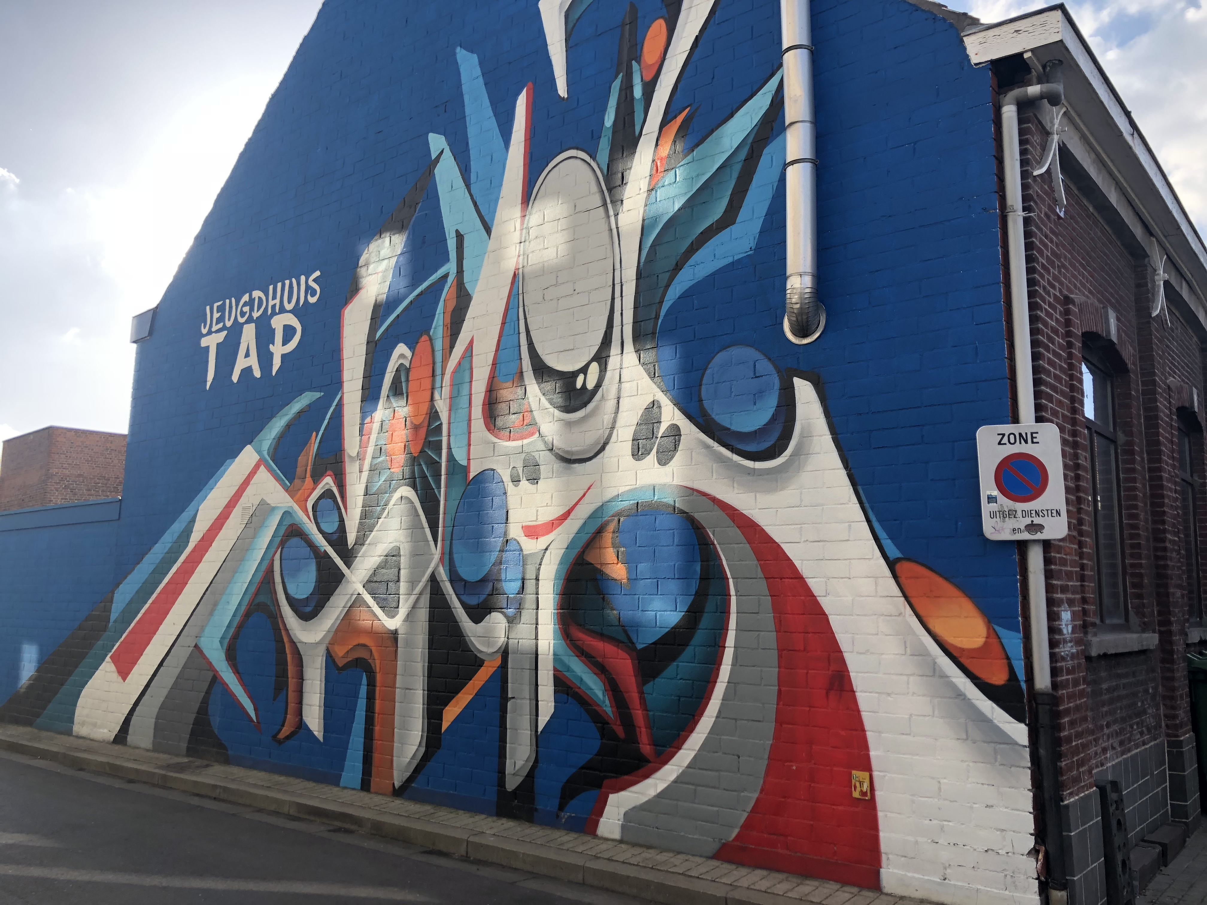 Jeugdhuis tap, gelegen op het marktplein van Kuurne, naast het stadhuis. Dit was vroeger een gemeenteschool.